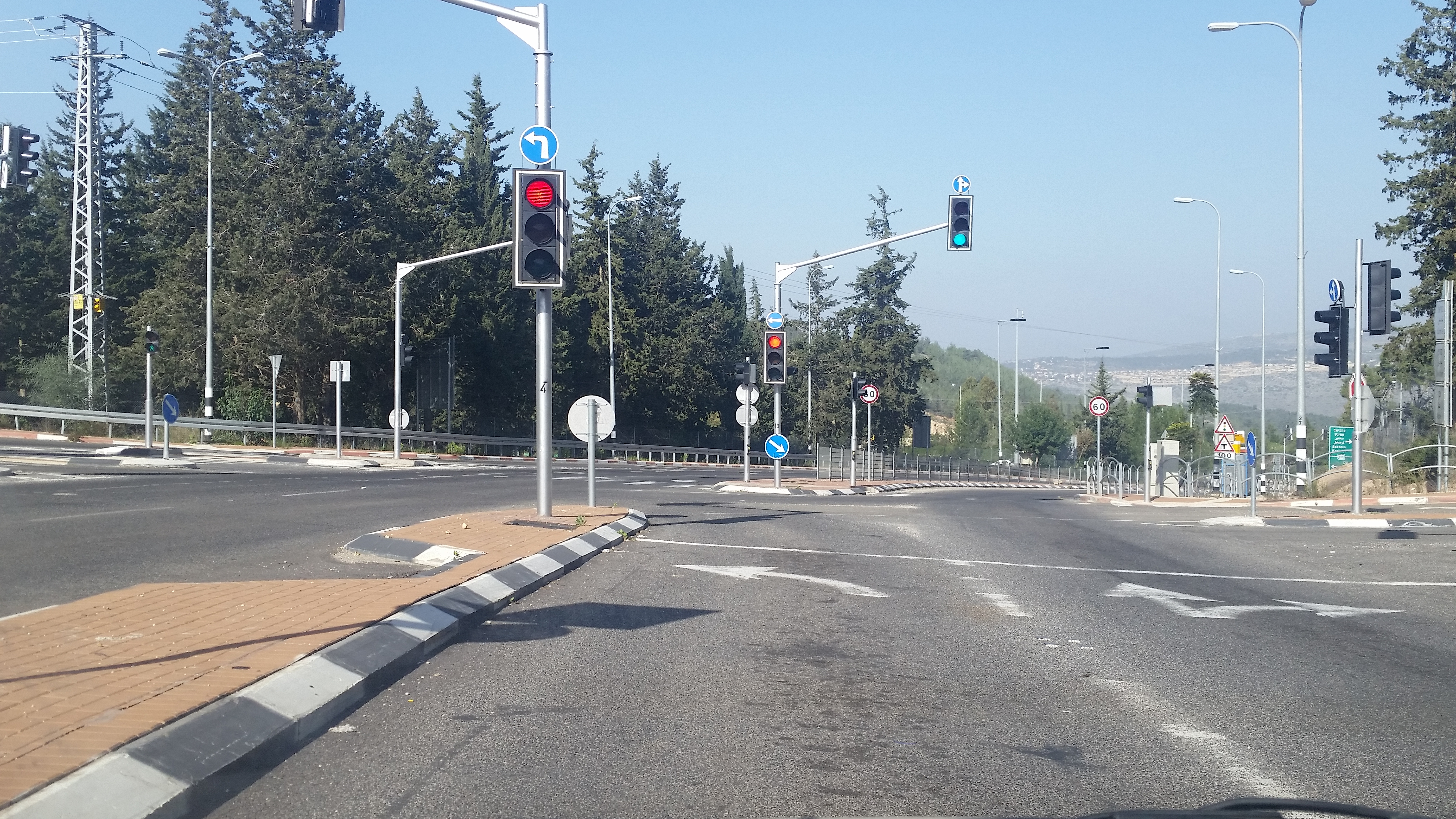 צומת משגב מכיוון צומת יודפת.